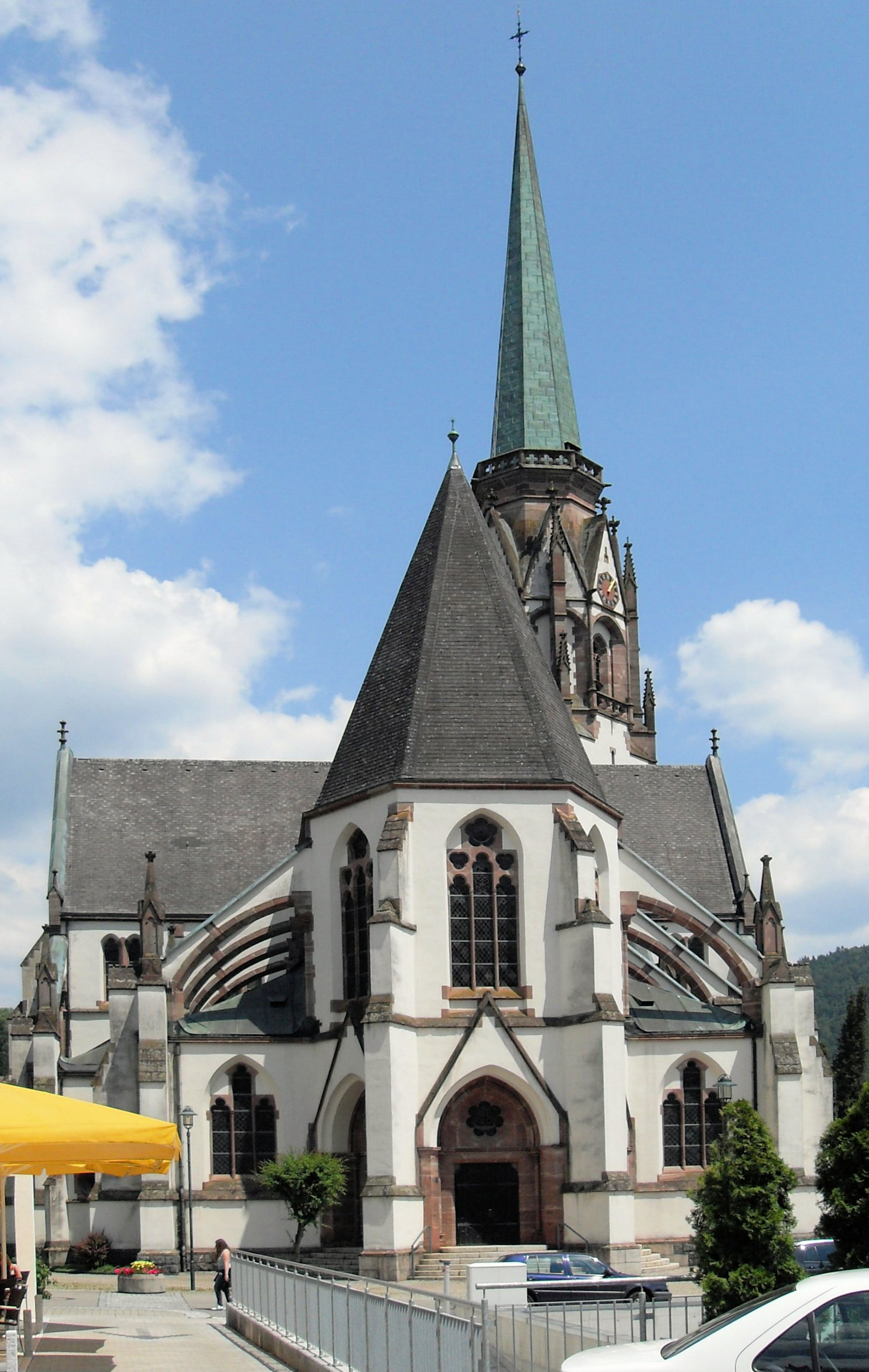 katholische Kirche Mariä Himmelfahrt in Schönau im Schwarzwald, Deutschland